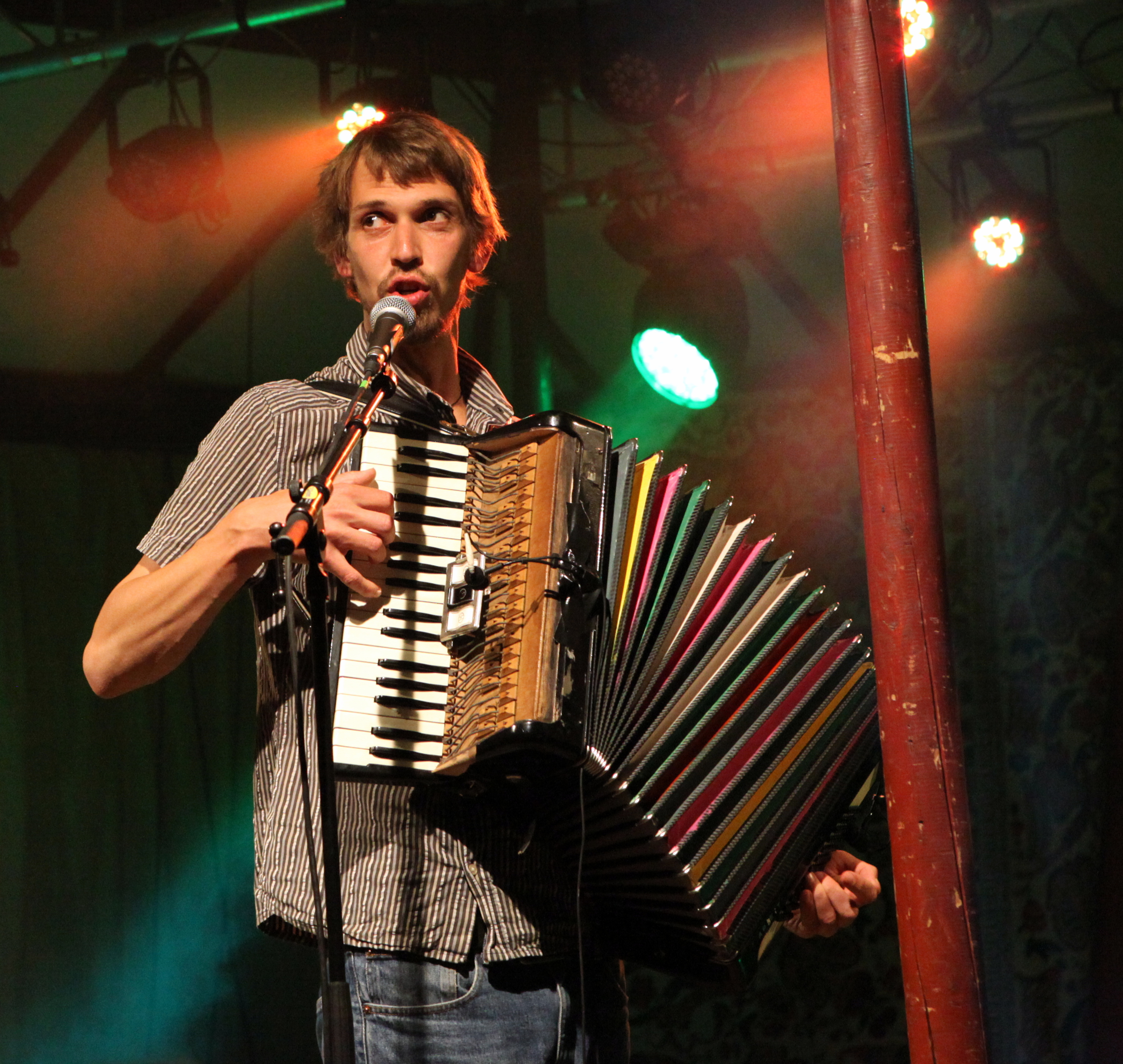 Sammersee-Festival 2014, Kofelgschroa Festivalsommer This photo was created with the support of donations to Wikimedia Deutschland in the context of the CPB project "Festival Summer". This file is made available under the Creative Commons CC0 1.0 Universal Public Domain Dedication. The person who associated a work with this deed has dedicated the work to the public domain by waiving all of their rights to the work worldwide under copyright law, including all related and neighboring rights, to the extent allowed by law. You can copy, modify, distribute and perform the work, even for commercial purposes, all without asking permission. Thomas Springer Personality rights warningAlthough this work is freely licensed or in the public domain, the person(s) shown may have rights that legally restrict certain re-uses unless those depicted consent to such uses. In these cases, a model release or other evidence of consent could protect you from infringement claims.